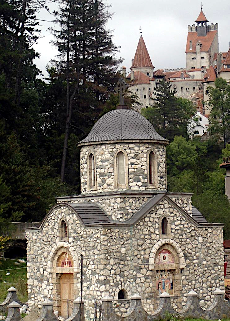 Stella Maris (Capela Reginei); copie a capelei de la Balcic, construită la Bran de Prinţesa Ileana pentru a adăposti vasul cu inima reginei, adusă în România după ce Cadrilaterul a fost cedat Bulgariei, în 1940. Capela a fost renovată în 2007.